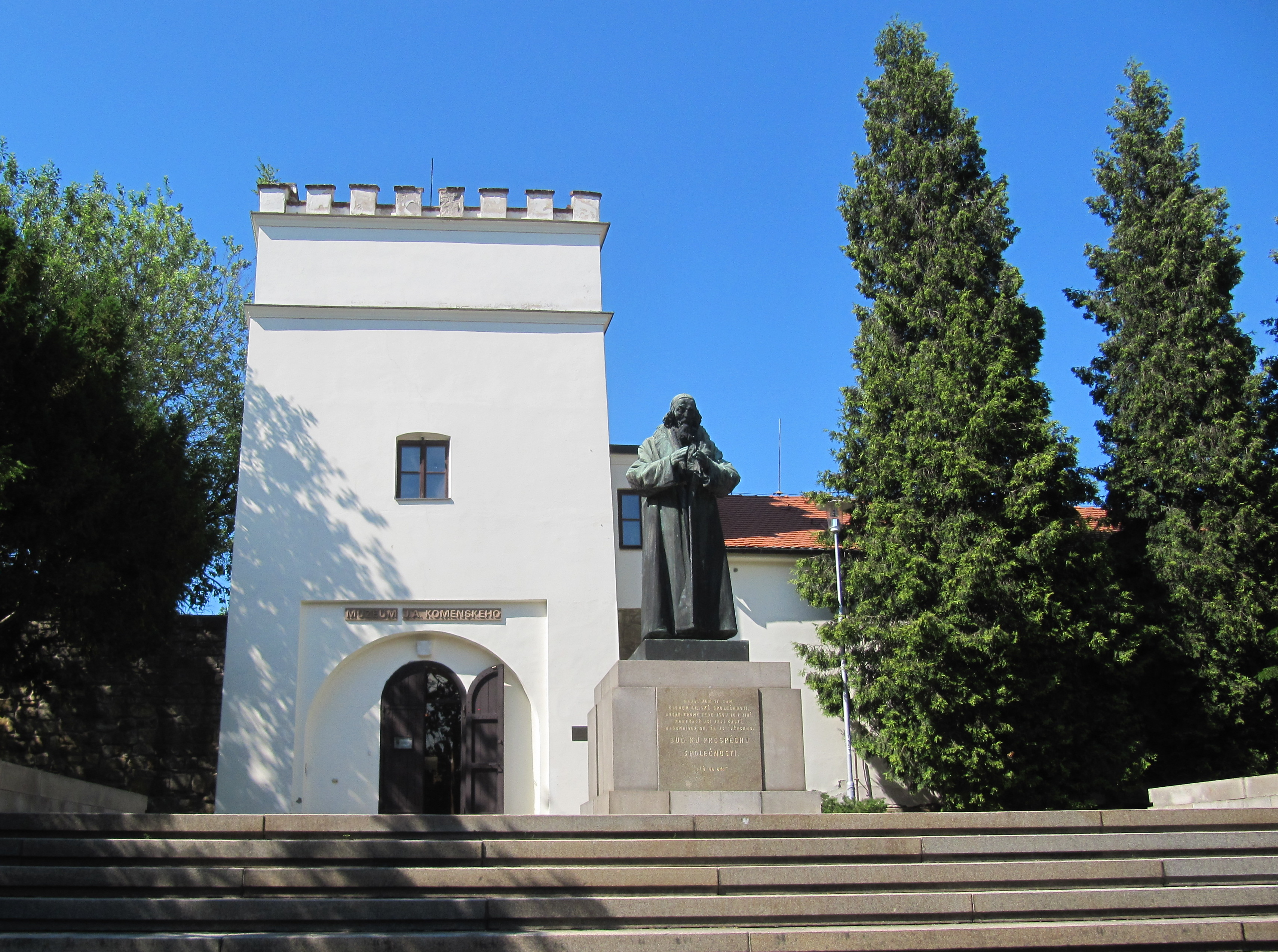 Pomník Jana Amose Komenského (Uherský Brod), při muzeu, Uherský Brod